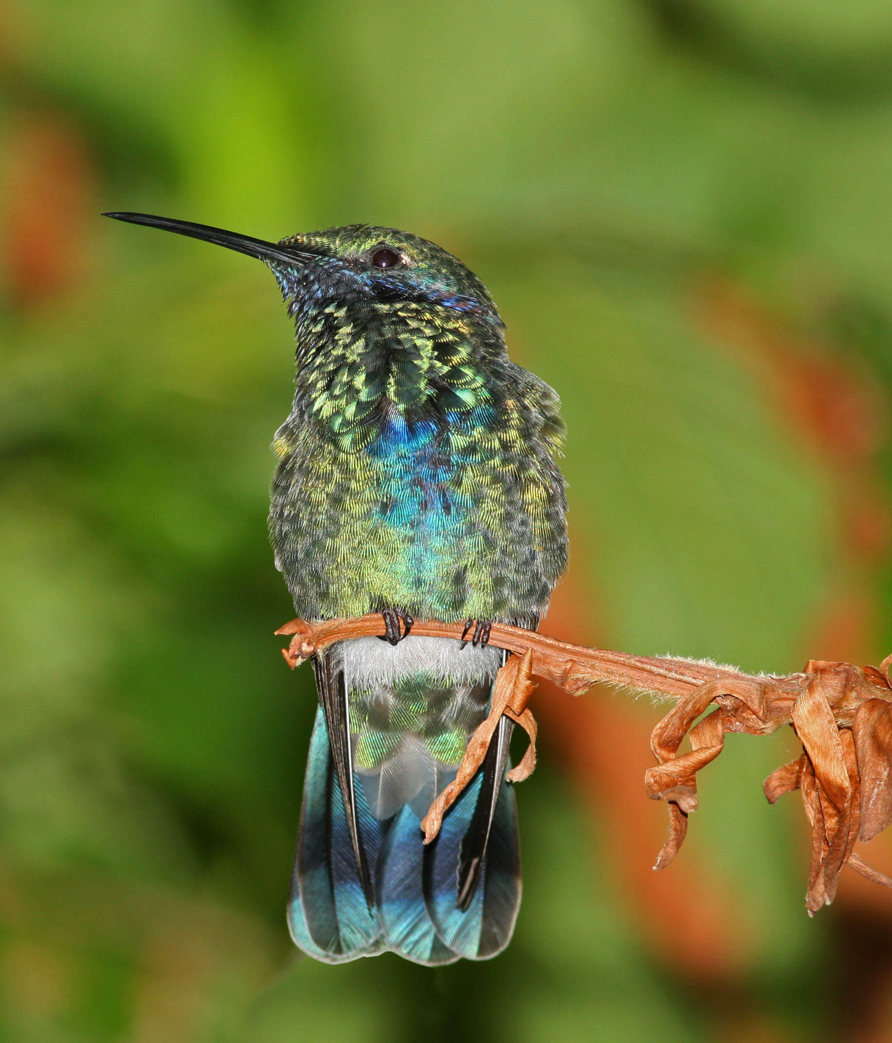 Sparkling Violetear (Colibri coruscans)